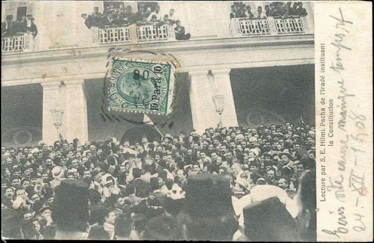 Реч на Хилми паша в Солун при обявяването на конституцията